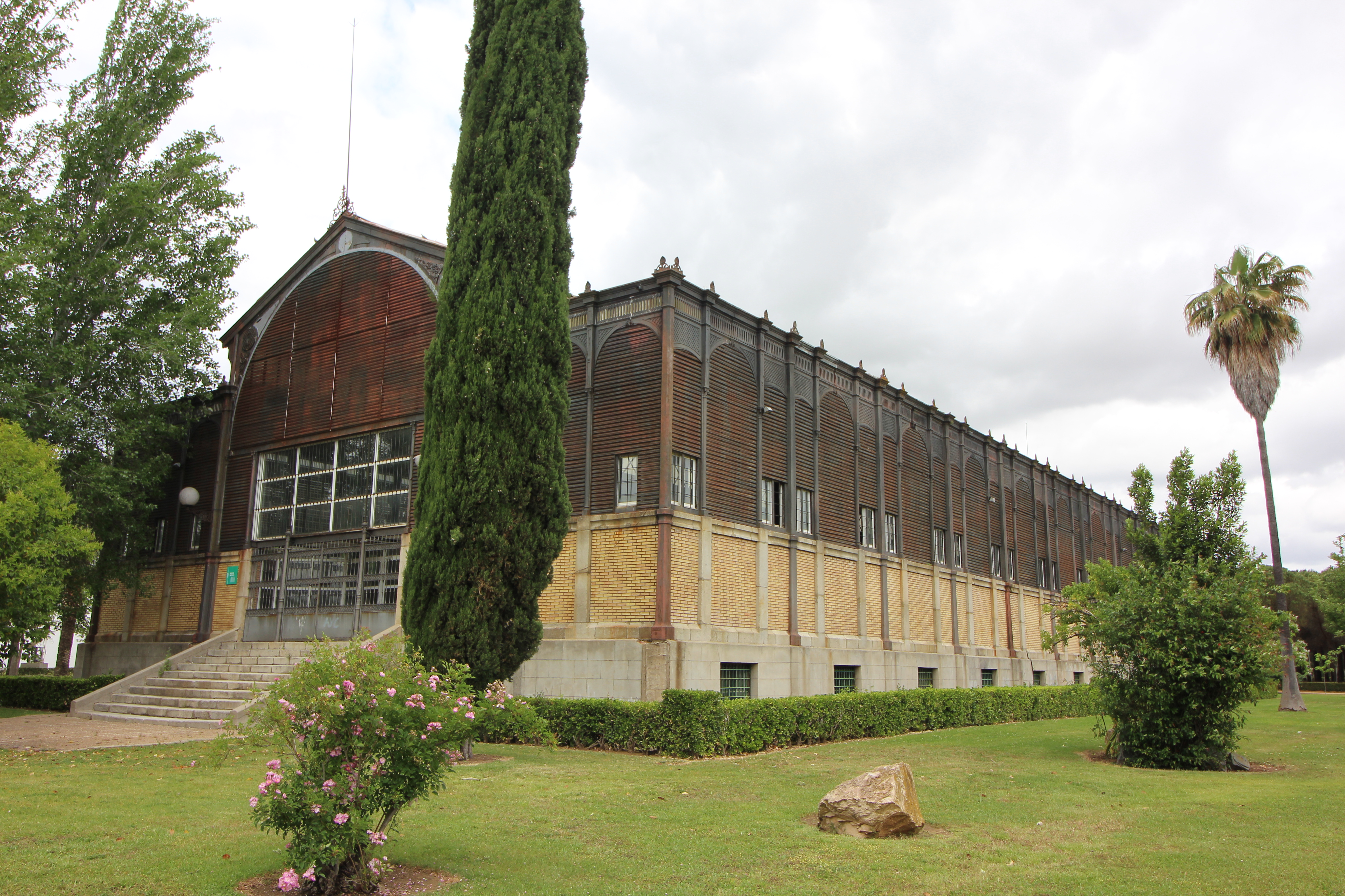 Antigua biblioteca central.